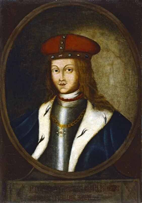 Беларуская (тарашкевіца): Вітаўт (Vitaŭt), карціна XVIII ст.